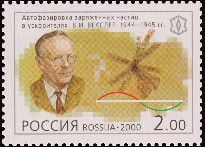 Автофазировка заряженных частиц в ускорителях. В. И. Векслер. 1944—1945 гг.